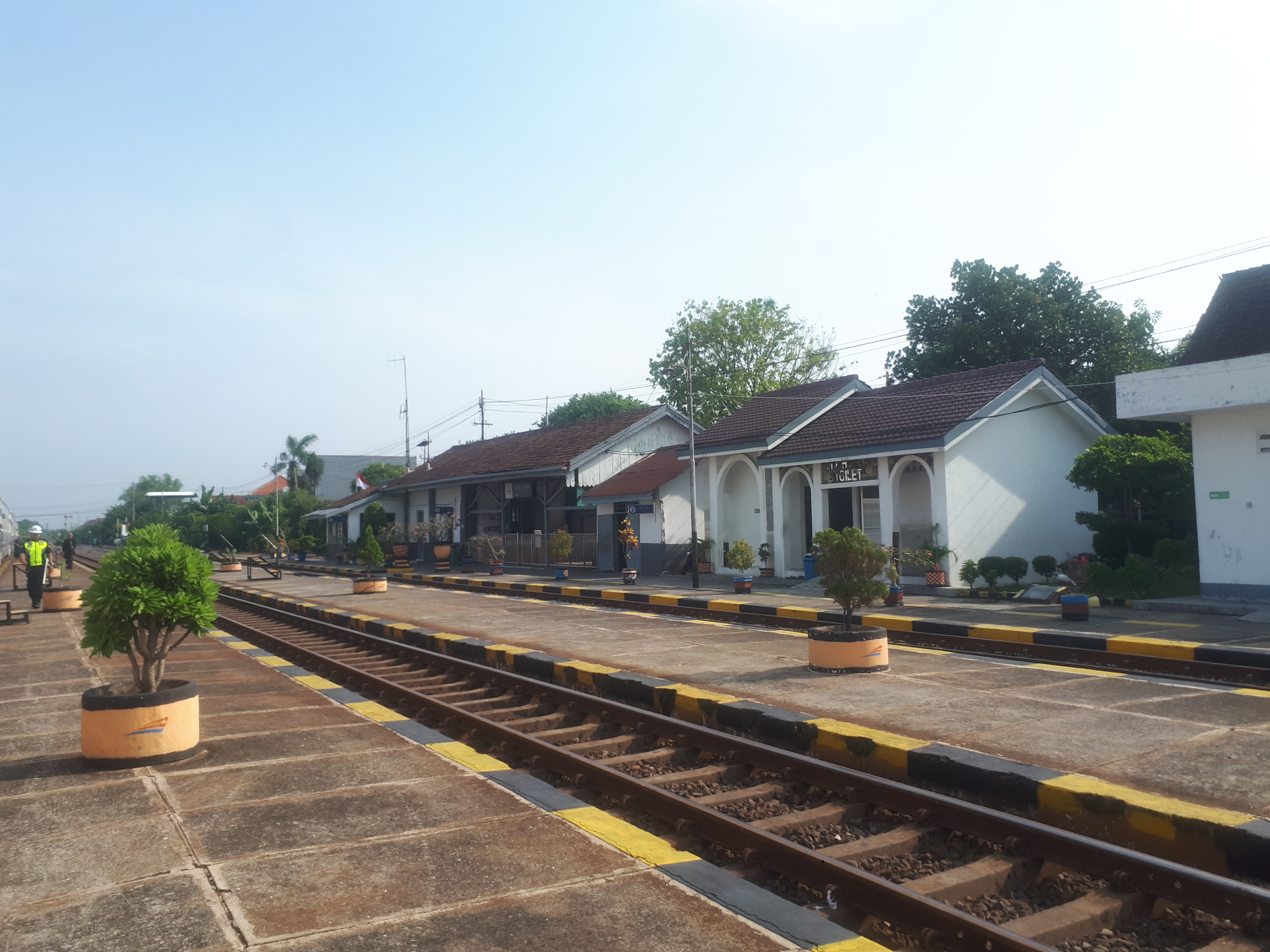 Stasiun Tanggulangin pada tahun 2020